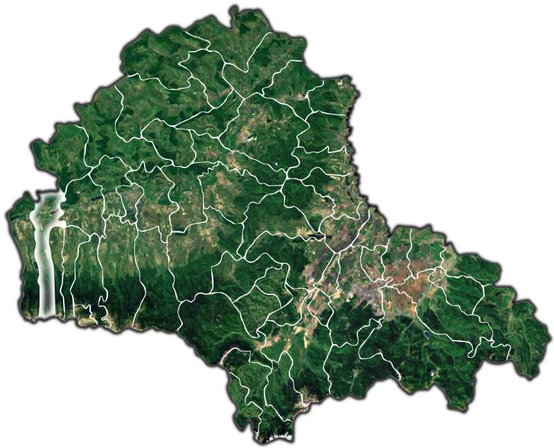 Vistea jud Brasov